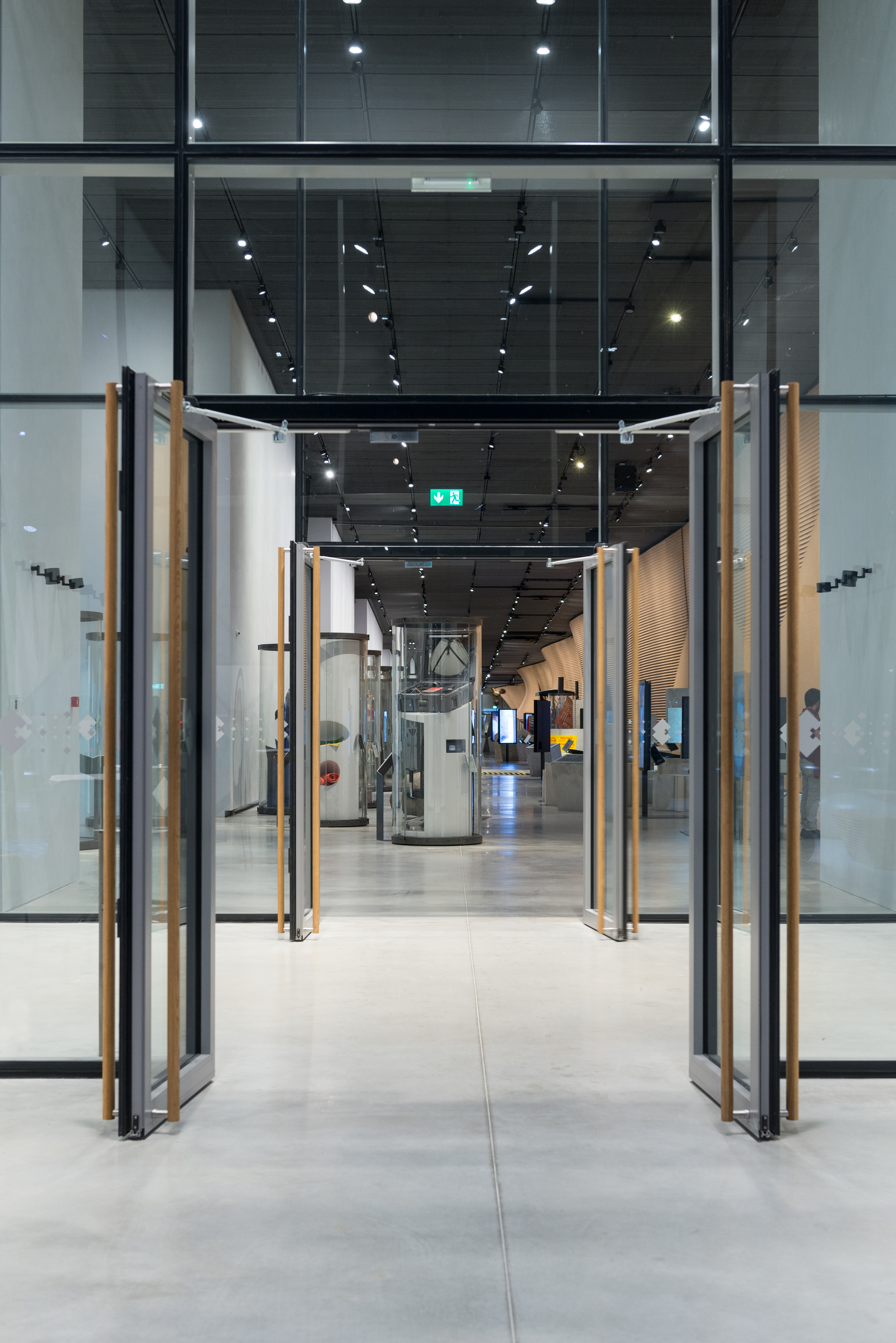 Eesti Rahva Muuseumi interjöör